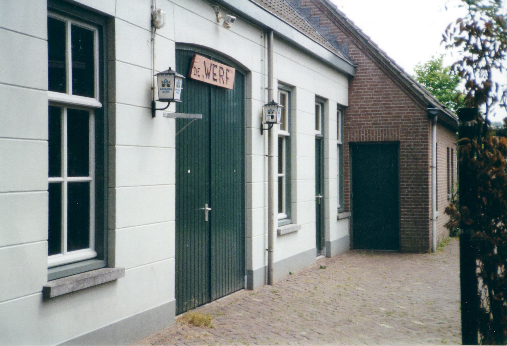 Ingang van OJC De Werf Gemaakt en ingescand door A. van Kaathoven (bestuurslid OJC De Werf).